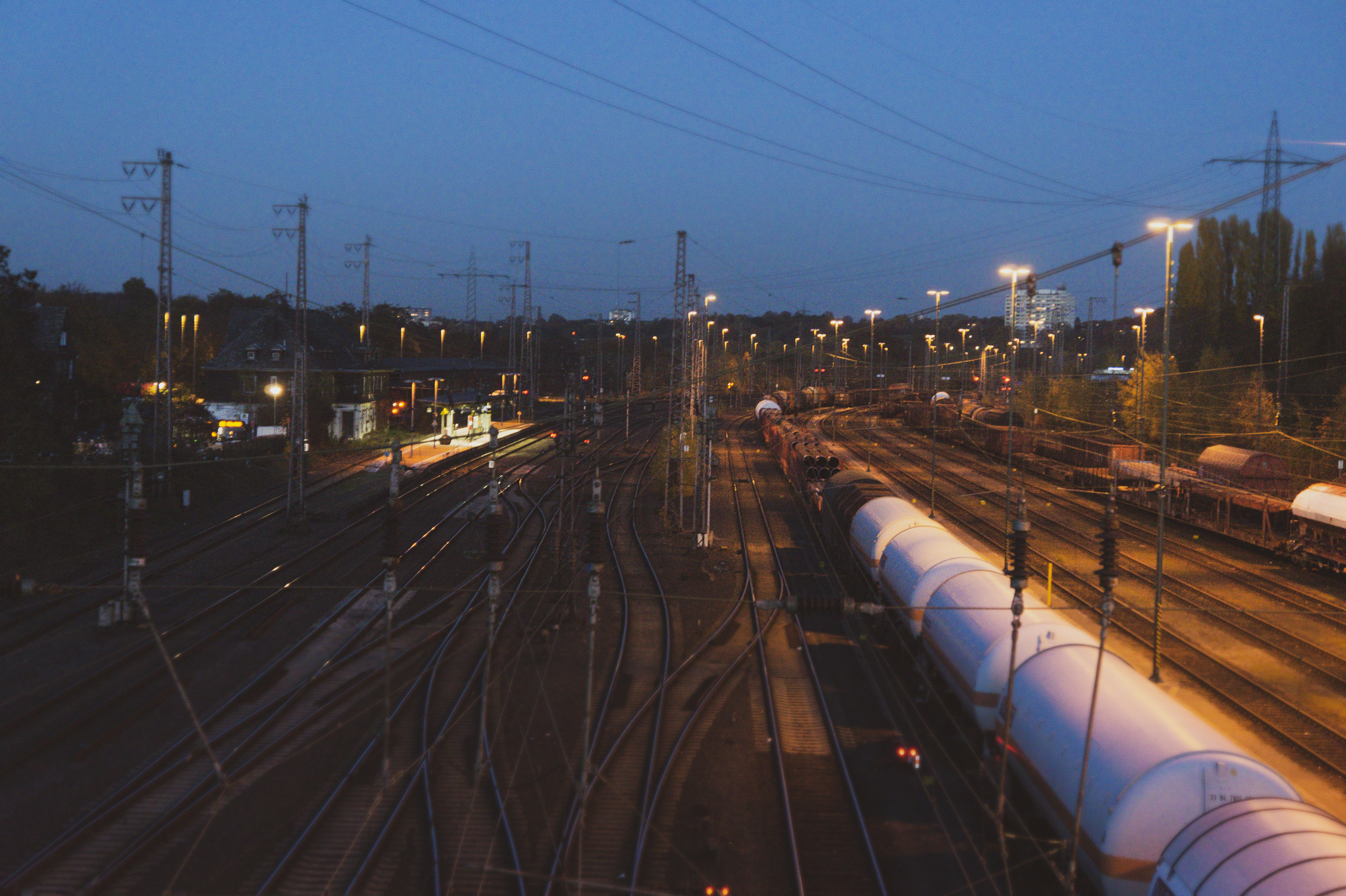 Bahnhof Hagen-Vorhalle. Fotografiert mit Sony α 3000